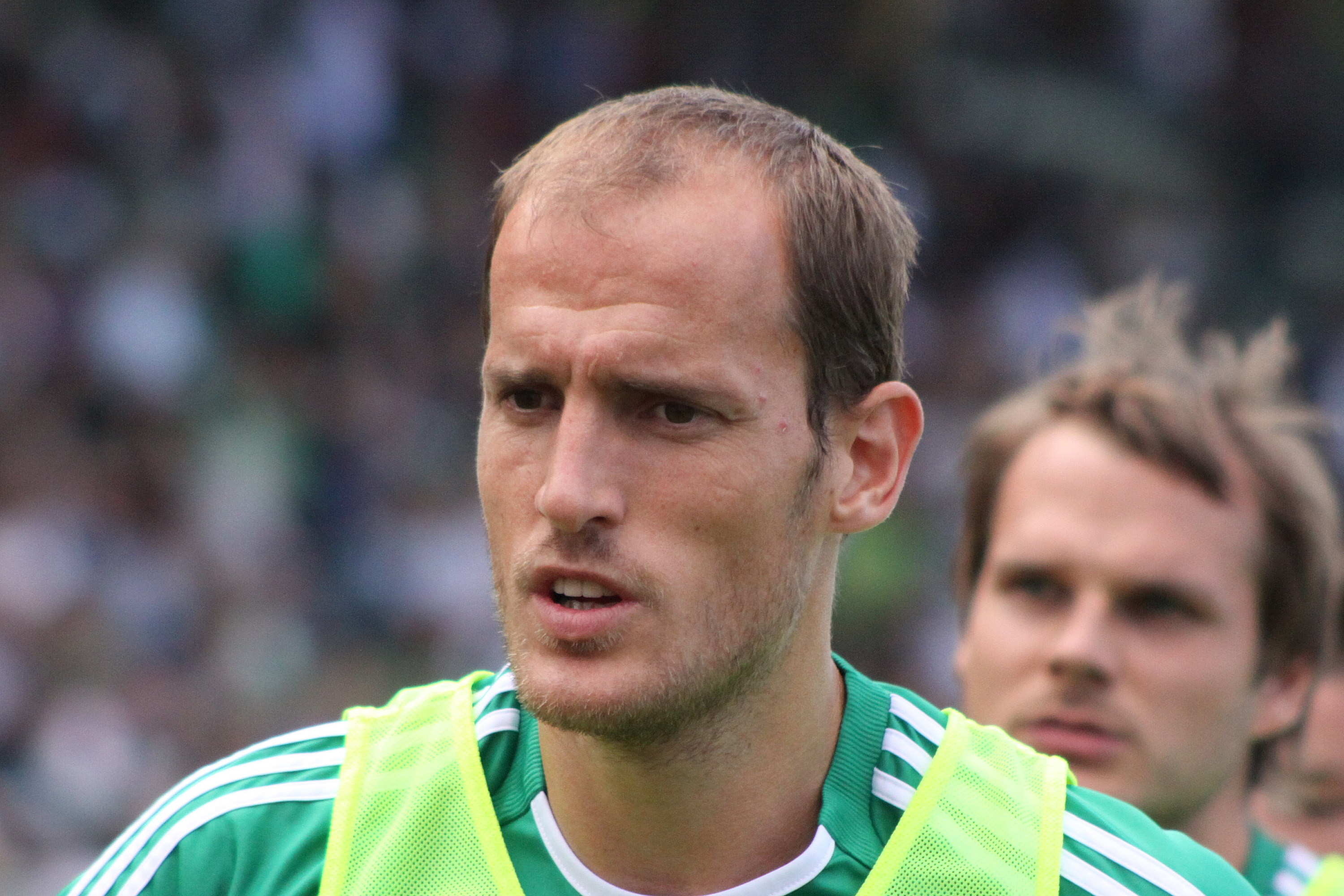 Jürgen Patocka - SK Rapid Wien (2)